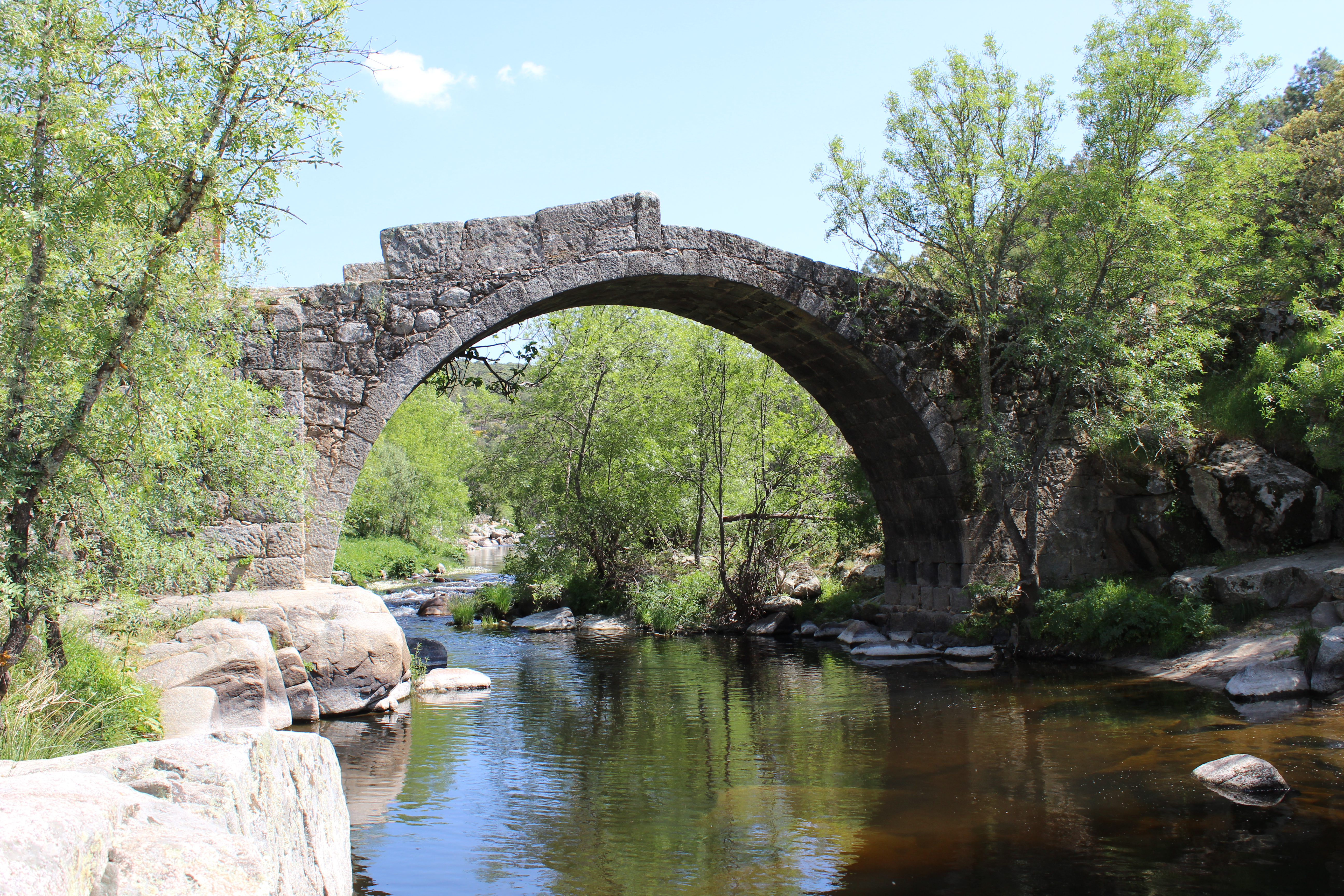 Puente romano de La Iglesuela, provincia de Toledo.